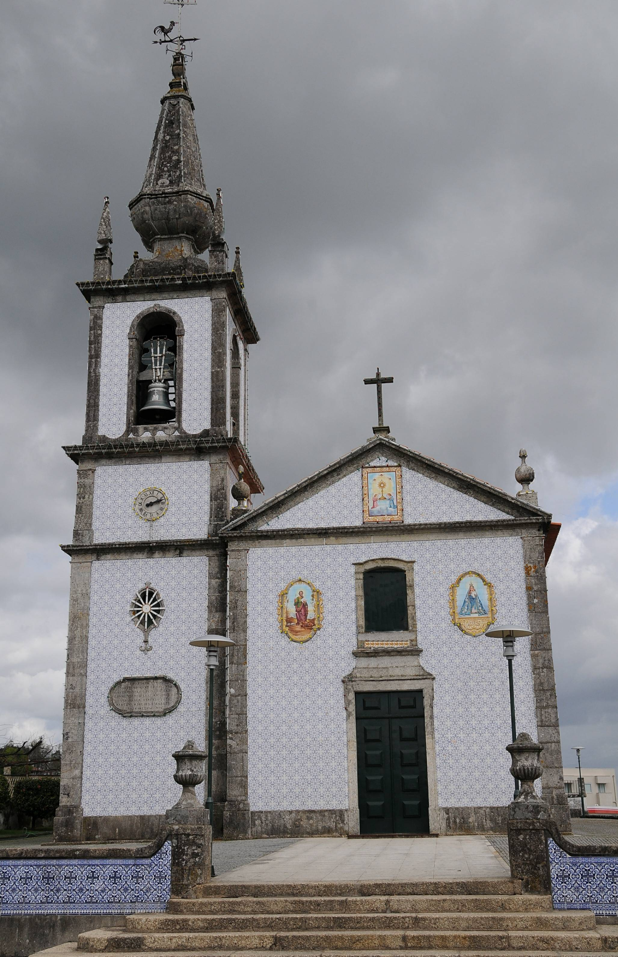 Tadim Church, in Braga, Portugal